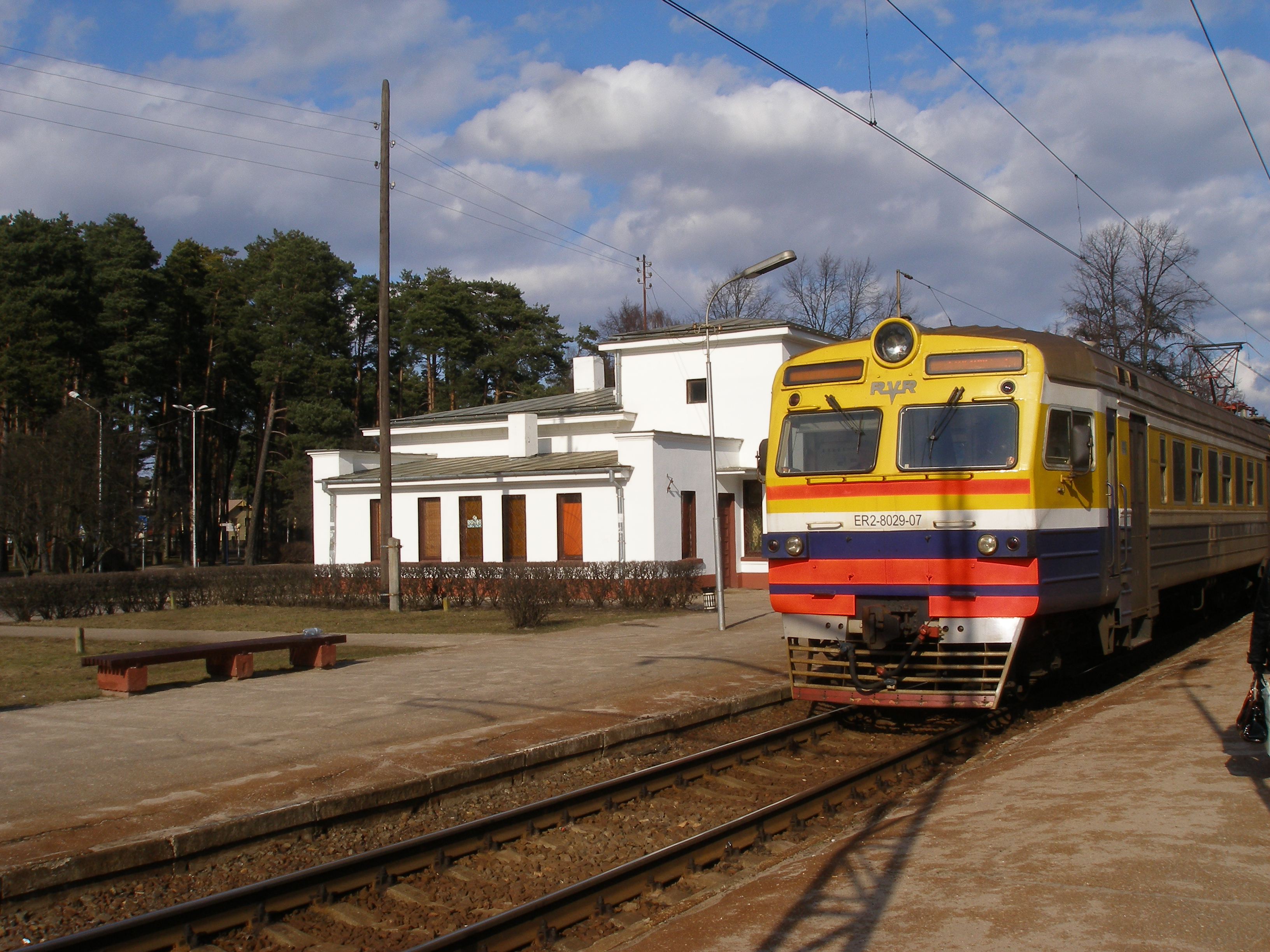 Elektrovilciens ER2-8029 Bulduru stacijā